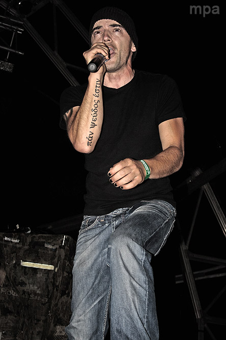 Jose Barros en el Festival Cultura Quente 2007 de Caldas de Reis (Pontevedra)